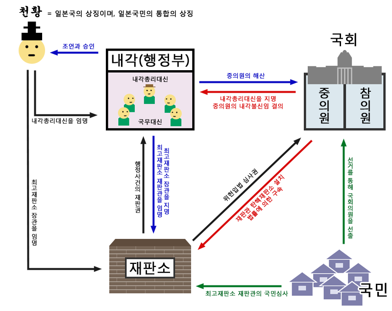 일본의 통치기구(파블린선생이 지으시고, 천어가 쓰다.)